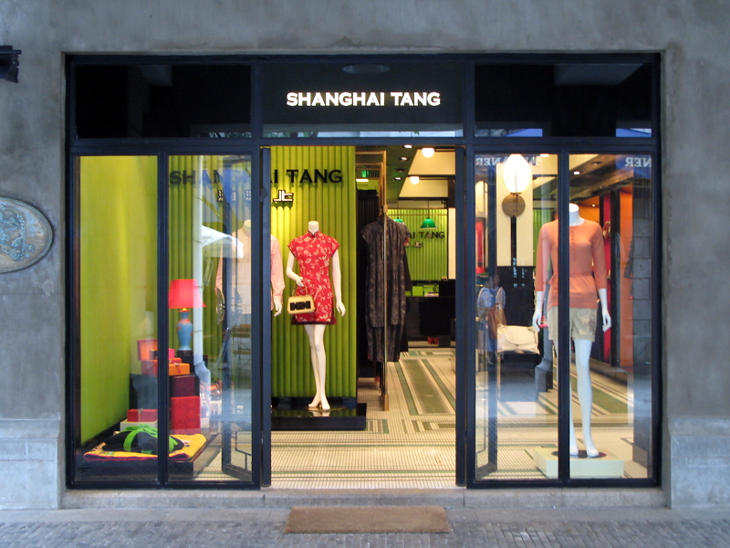 Shanghai Tang Xin Tan Di Store.jpg